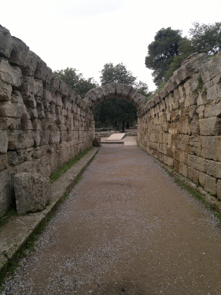 Ancient Olympia, Greece. Photo taken with Nokia N8 (12 Megapixel). Αρχαία Ολυμπία. Φωτογραφία που τράβηξα με το Nokia N8.